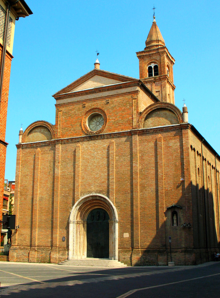 Facciata del Duomo di San Giovanni Battista, Cesena.